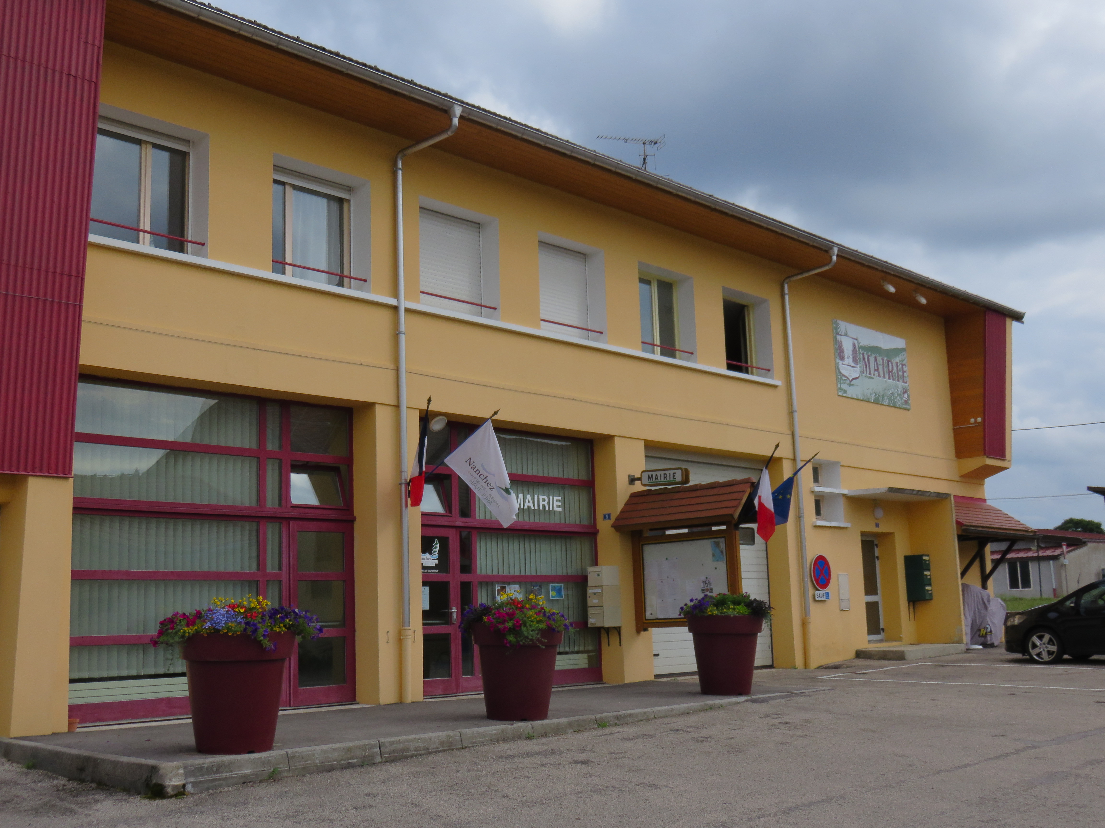 Mairie de Chaux-des-Prés (Jura, France).